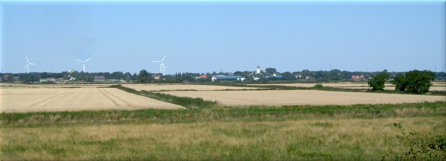 Blick auf Struckum von einer alten Deichlinie in der Marsch.